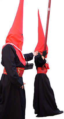 Túnica de la Archicofradía Sacramental de Medinaceli